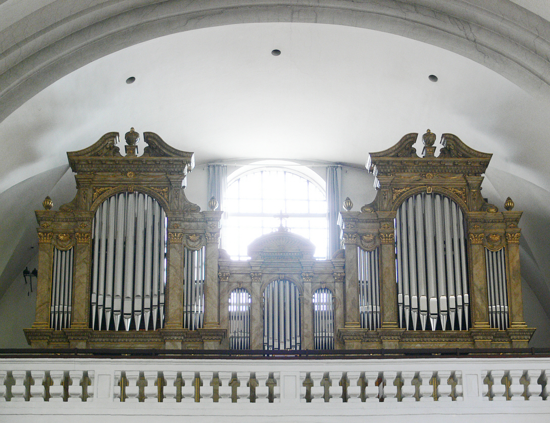 Pfarrkirche St. Martin, Bamberg Orgel von Fa. Steinmeyer, Oettingen, 1894 (2002 restauriert)